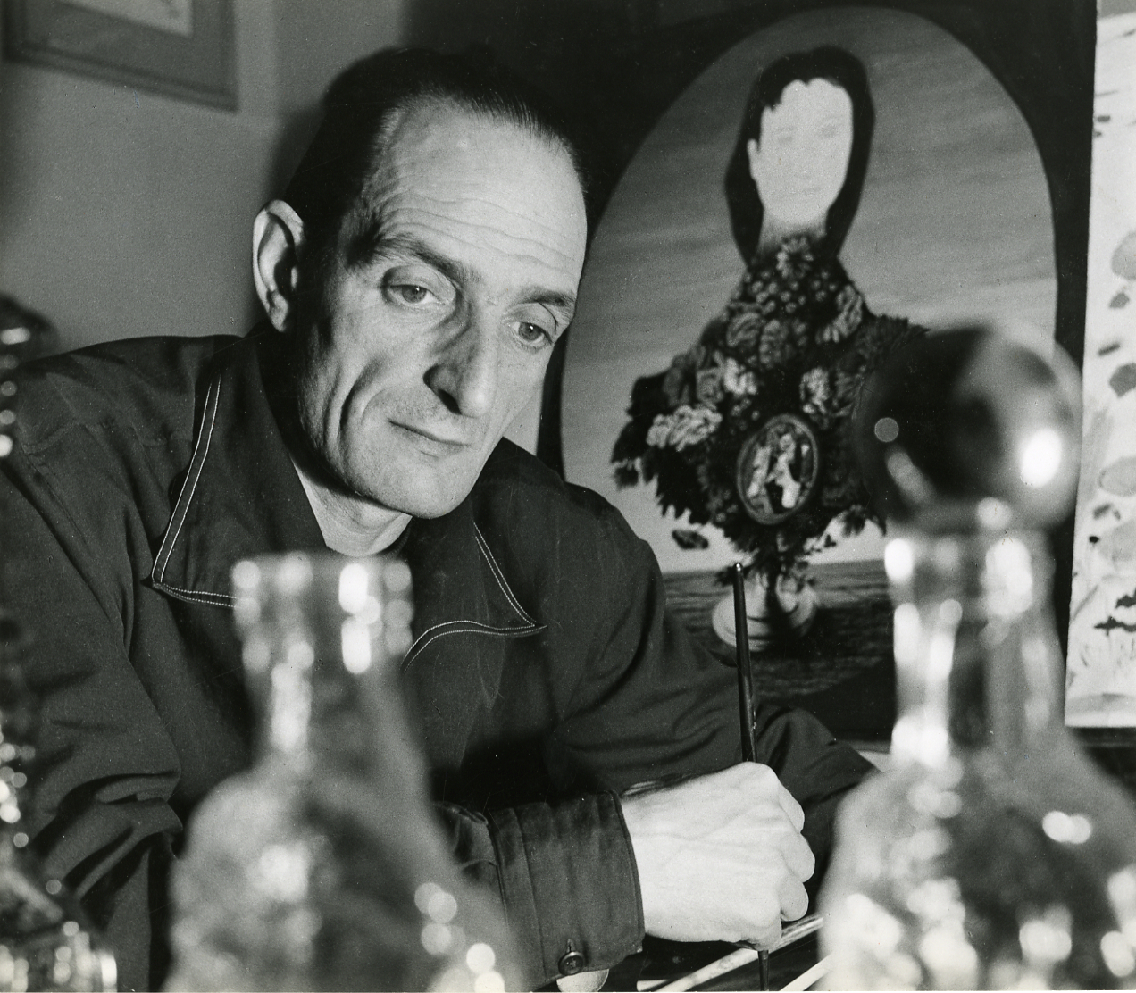 Servizio fotografico : Italia, 1954 / Paolo Monti. - Stampe: 4 : Positivo b/n, gelatina bromuro d'argento/ carta, 30x40. - ((Al verso di due stampe manoscritto: "Il pittore Sirio Musso 1954". La suddetta serie è contenuta nella scatola identificata con la numerazione 124. Sul coperchio della scatola manoscritto: "Ritratti - Figure ambientate". - Fonte: Rubrica di Paolo Monti: Archivio 10x12 (ultimi numerati) - dal G1 al (s.d.), presso Archivio Paolo Monti